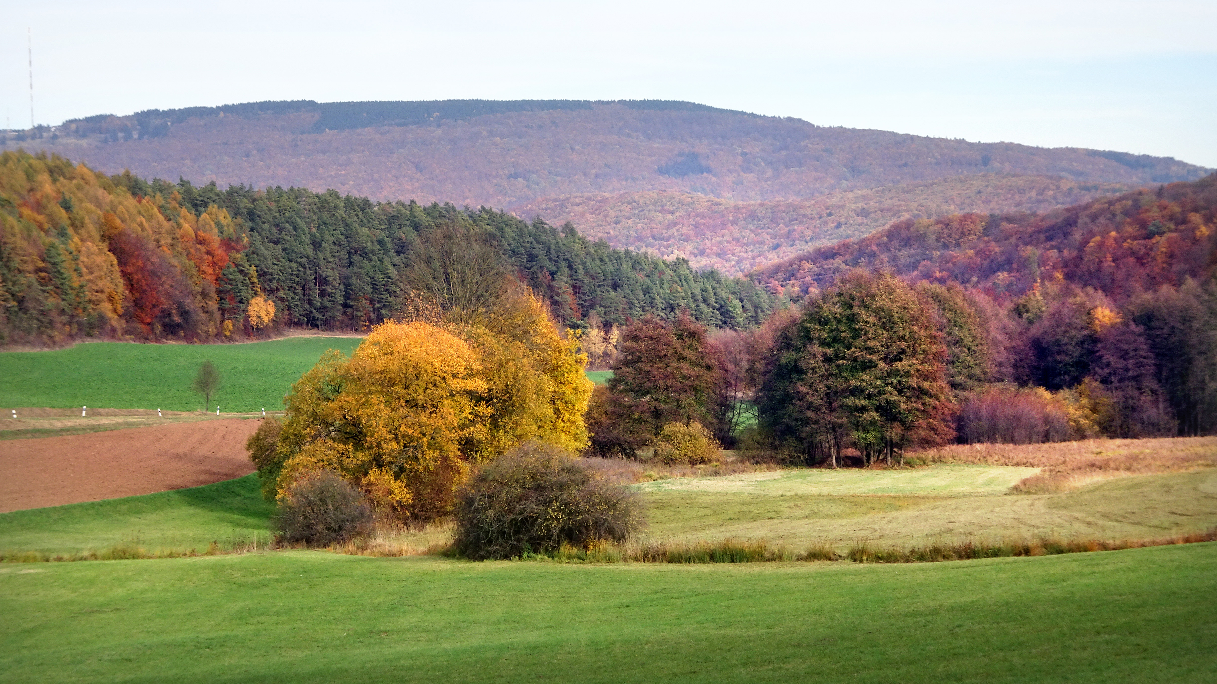 Blick von Süden auf den Bereich um das Niedermoor im Weißbachtal. Im Hintergrund der Hohe Meißner. Das Weißbachtal bei Reichenbach ist ein durch landwirtschaftliche Nutzung geprägtes Wiesental nordöstlich des Ortsteils Reichenbach der Stadt Hessisch Lichtenau im nordhessischen Werra-Meißner-Kreis. Die naturschutzfachliche Bedeutung des Tals begründet sich vor allem auf das kalkreiche Niedermoor mit seinen Quellbereichen, das zum Standort bedrohter Pflanzenarten geworden ist. Um diesen wertvollen Lebensraum zu sichern und zu erhalten wurde 1990 das Weißbachtal als Naturschutzgebiet ausgewiesen und seit 2008 ist es als Flora-Fauna-Habitat-Gebiet Teil des europäisch vernetzten Schutzgebietssystems Natura 2000.